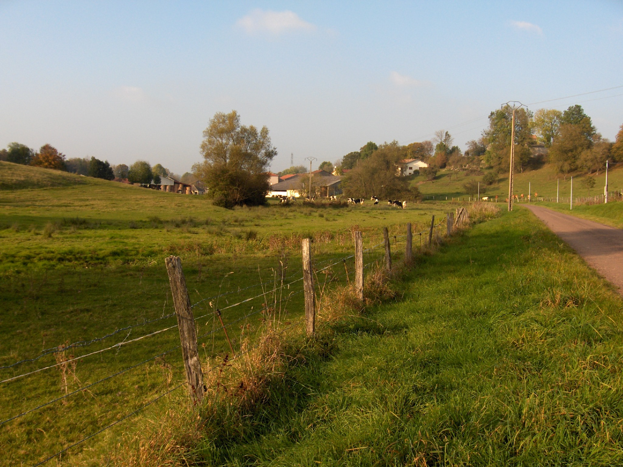 L'entrée du village de Saudron (Haute-Marne) en arrivant de Gillaumé